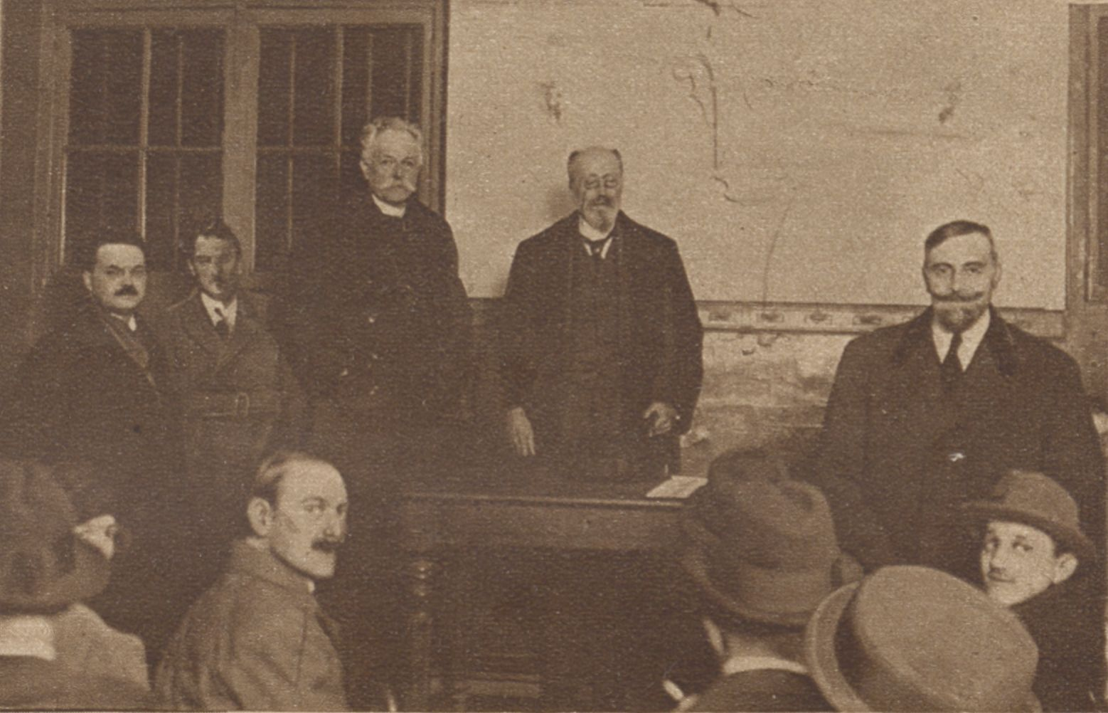 Le général Sarrail à une réunion électorale du Bloc républicain de gauche.